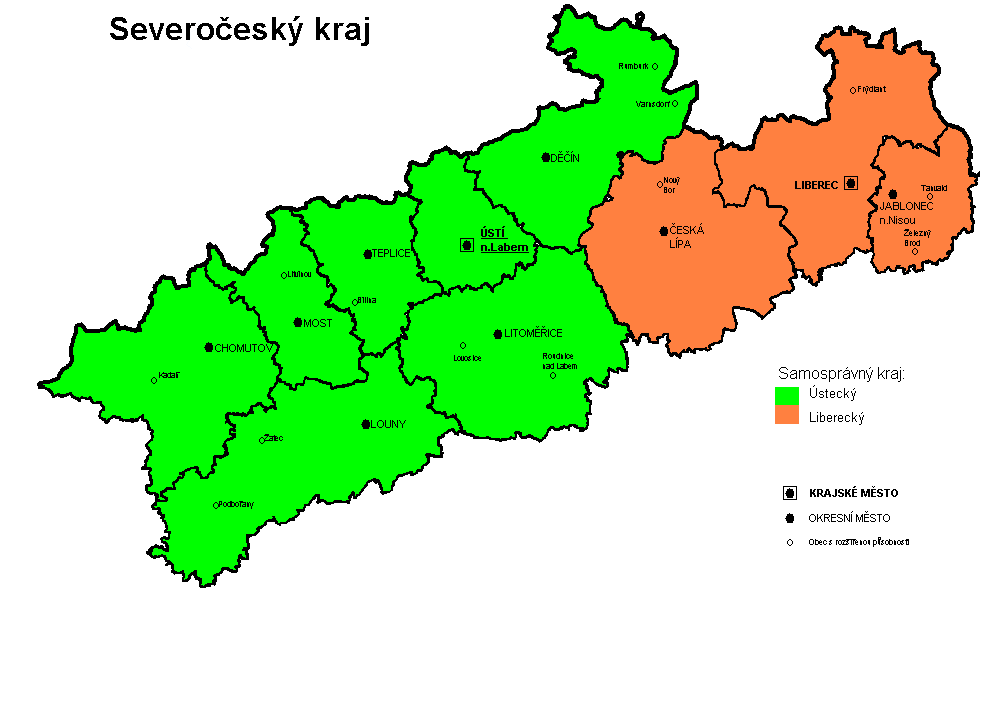 Mapa Severočeského kraje (1960-1990) , poskládáno z map NUTS, uravneo v editoru